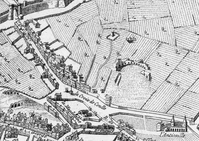 Détail du plan scénographique de Lyon, reproduction de Maurille-Antoine Moithey de 1780.